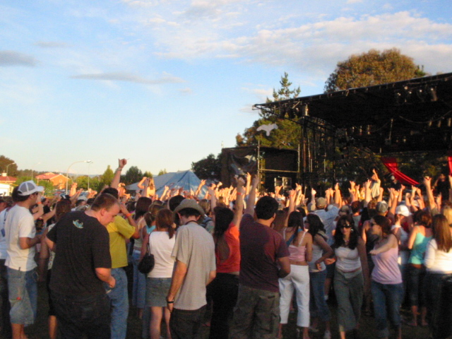 Village Fair 2004